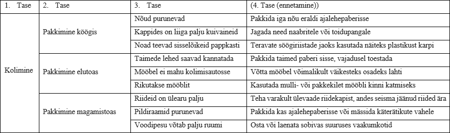 RBS näidis kolimisprojektina